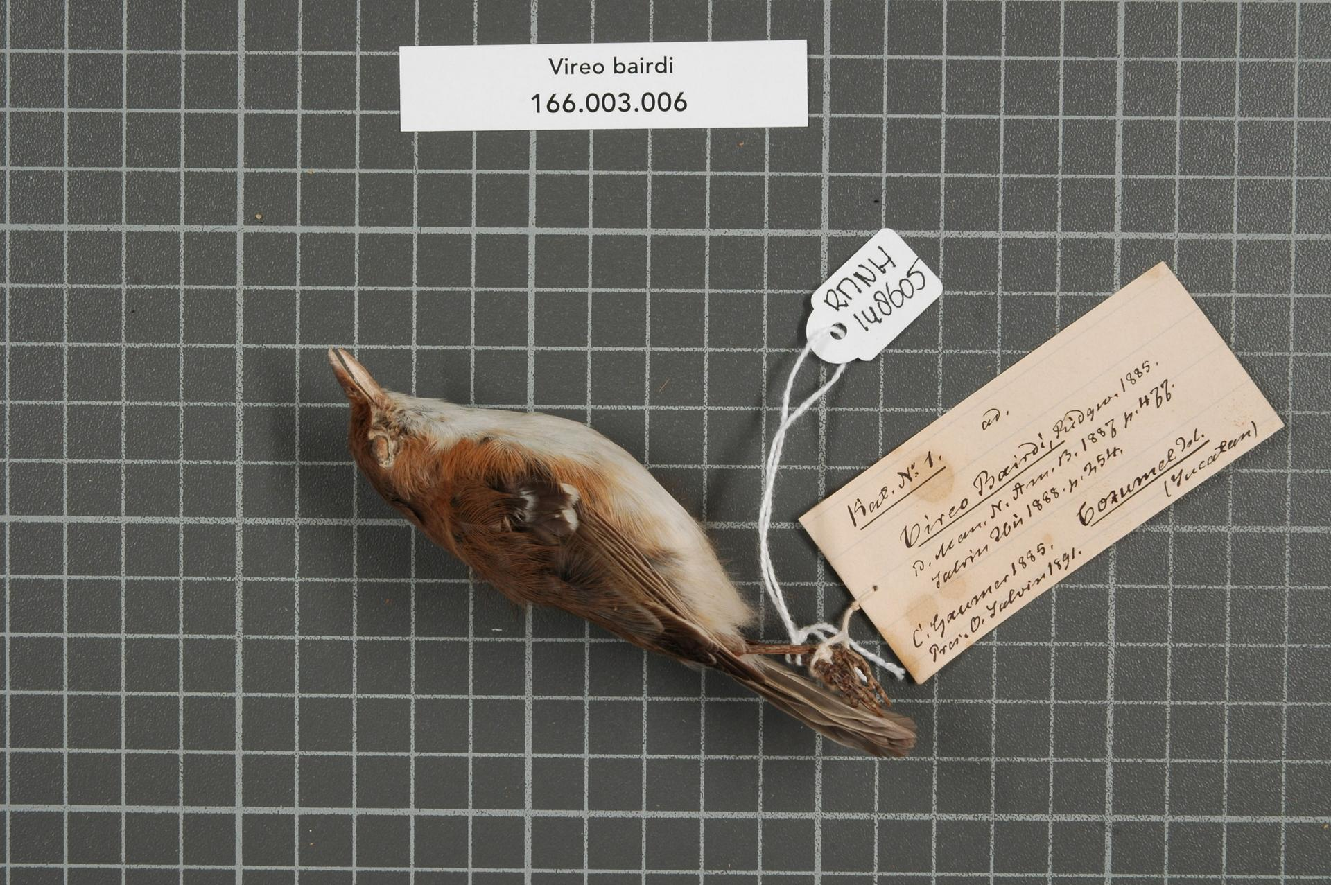 Vireo bairdi Ridgway, 1885